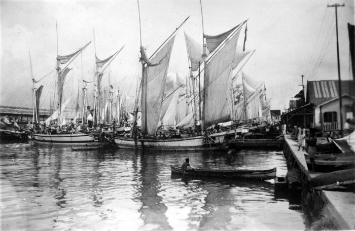 Repronegatief. Haven te Makassar, Zuid-Celebes